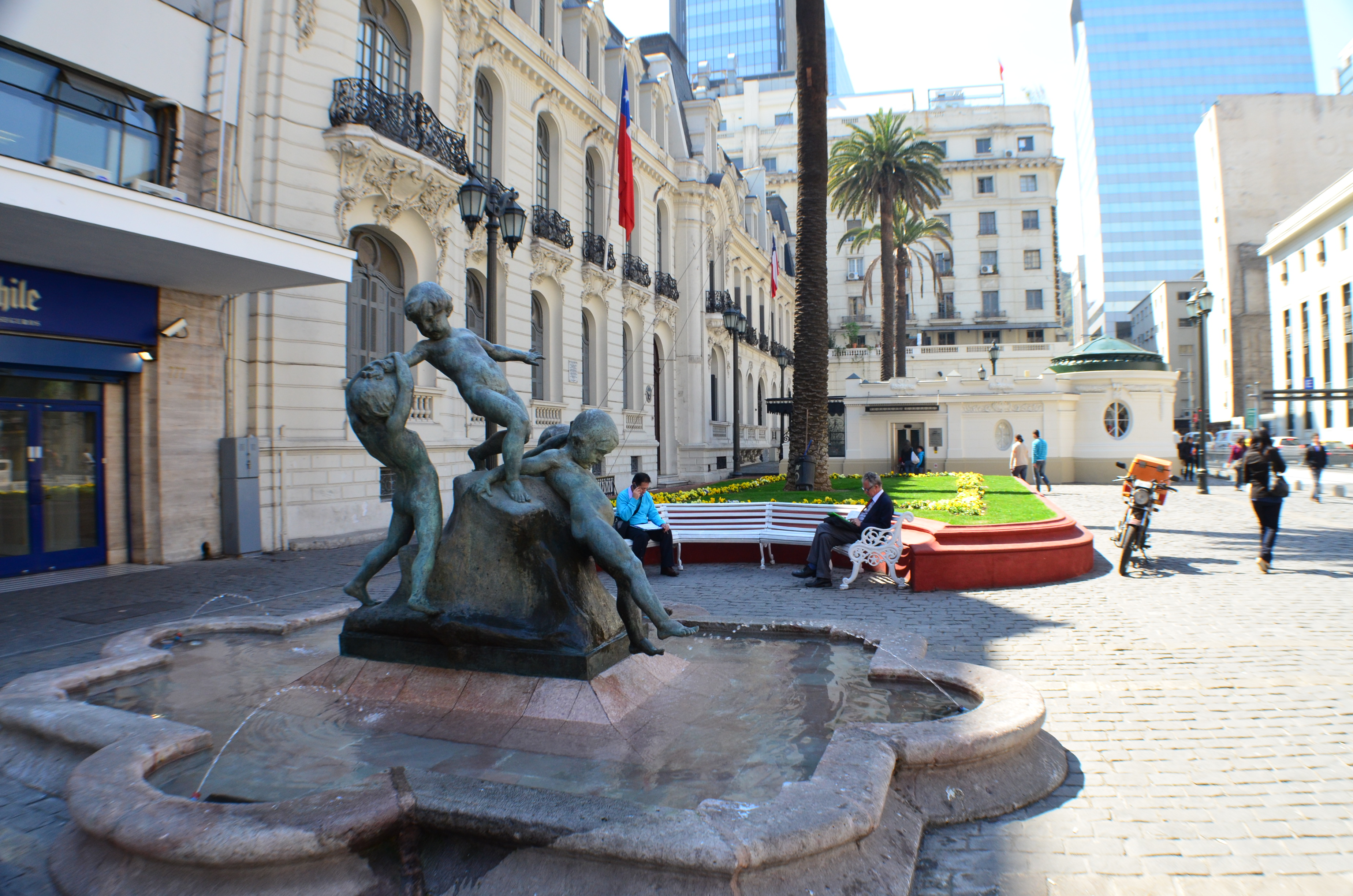 La plazoleta Patricio Mekis es una plaza ubicada en la calle Agustinas de Santiago de Chile, frente al Teatro Municipal que, junto con los inmuebles circundantes, fue declarada Monumento Nacional en 1973. Foto tomada de poniente a oriente (W to E): en el primer plano, la Fuente de los niños, obra del escultor argentino Arturo Dresco; más adelante, a la izquierda, el Palacio Subercaseaux. This is a photo of a national monument in Chile: 815